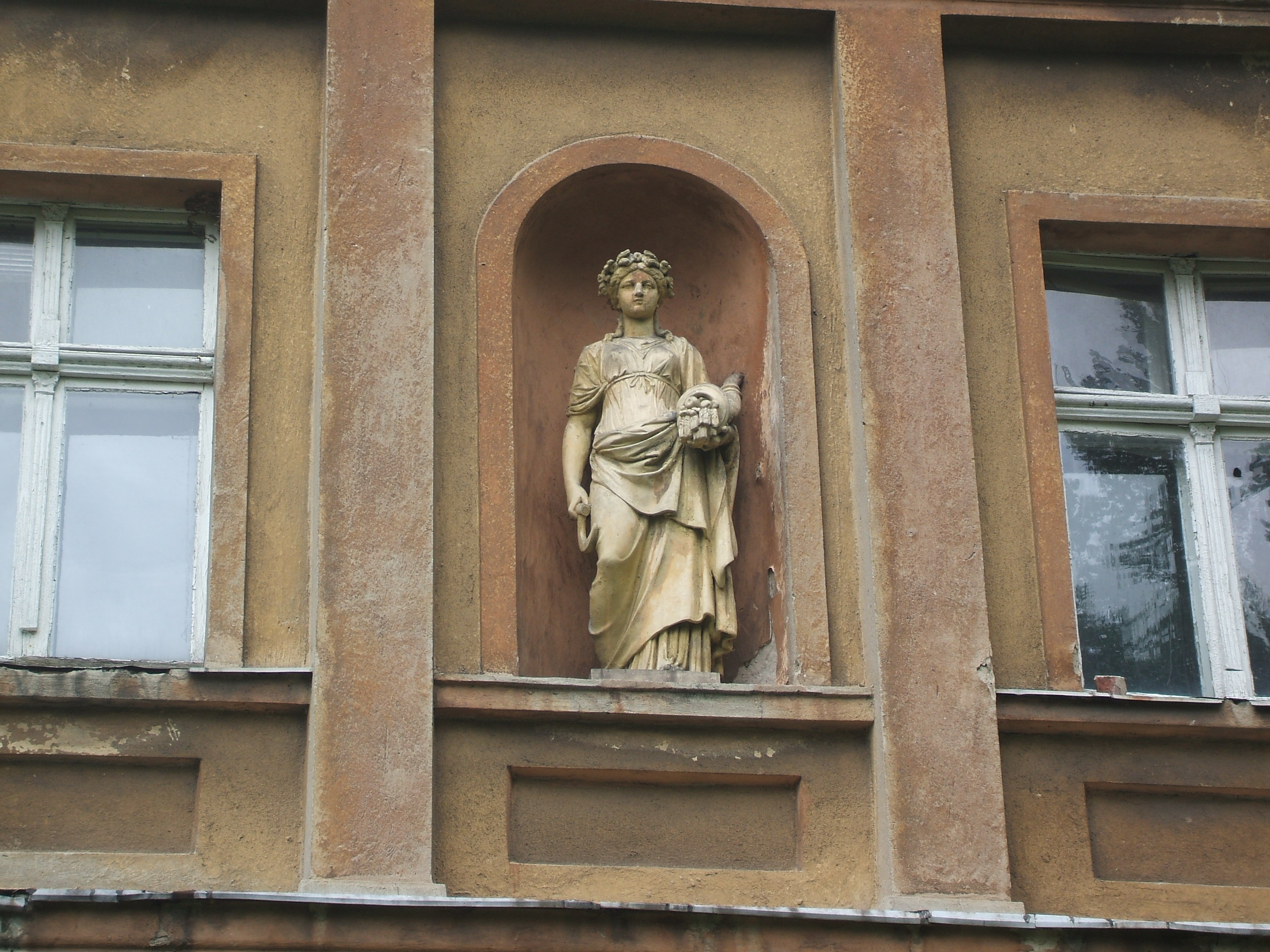 Rzeźba przedstawiająca zbiory lub lato .